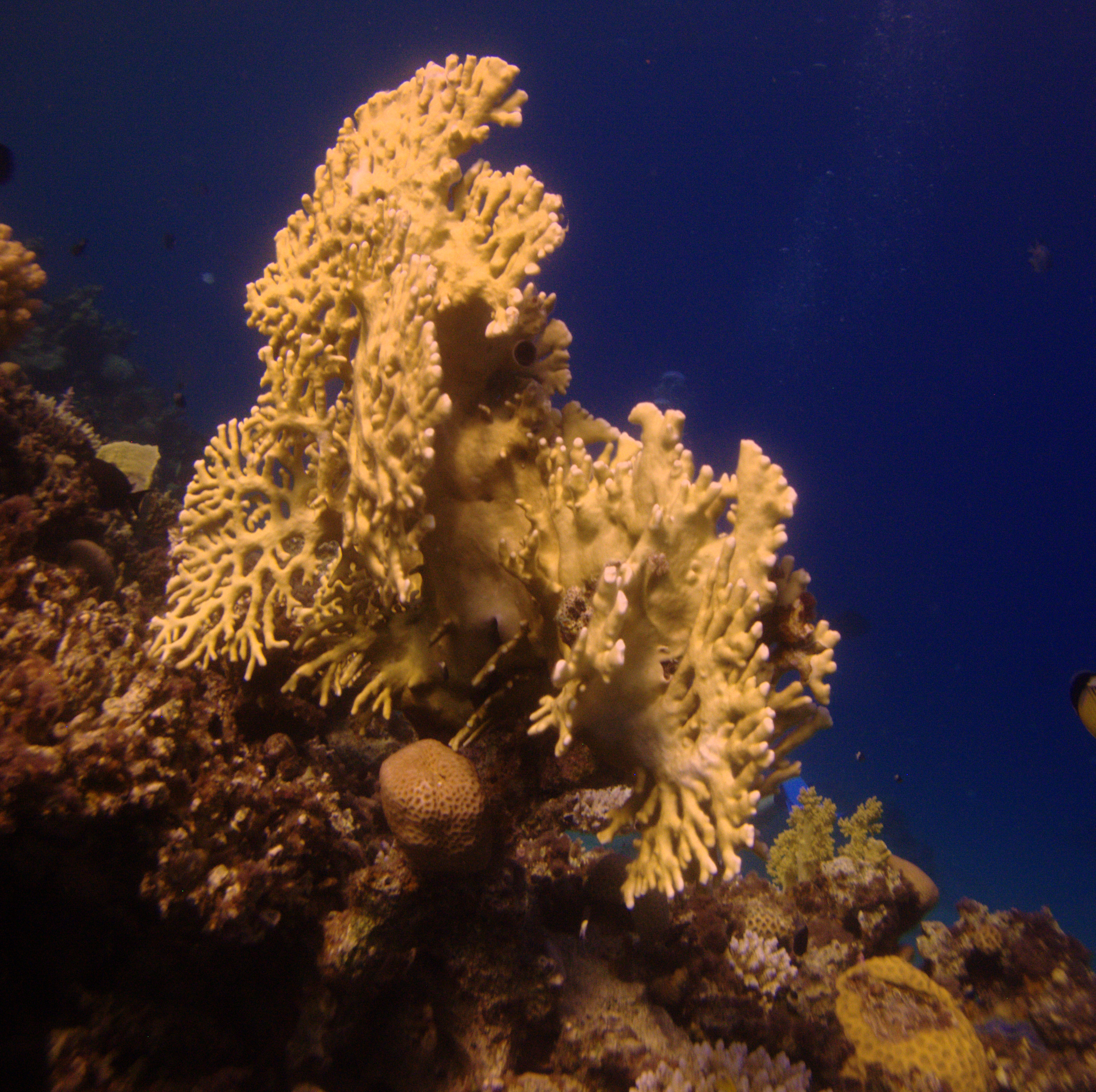 Millepora dichotoma en Janub Sina', Egipto, 2013